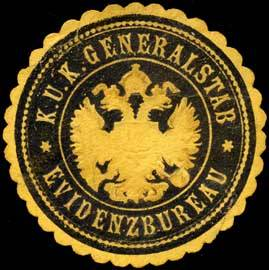 Sealing stamp Title: K.u.K. Generalstab - Evidenzbureau Description: gelb, schwarz, geprägt Place: Wien size: 4 cm